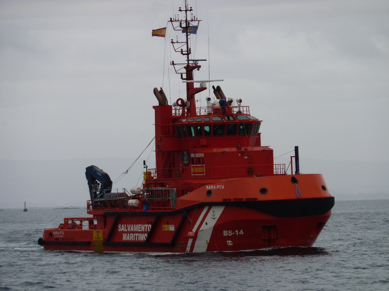 UNV 660 SD